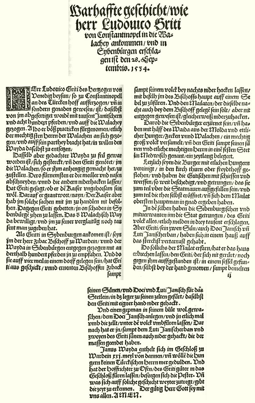 Egykorú ujság Gritti haláláról